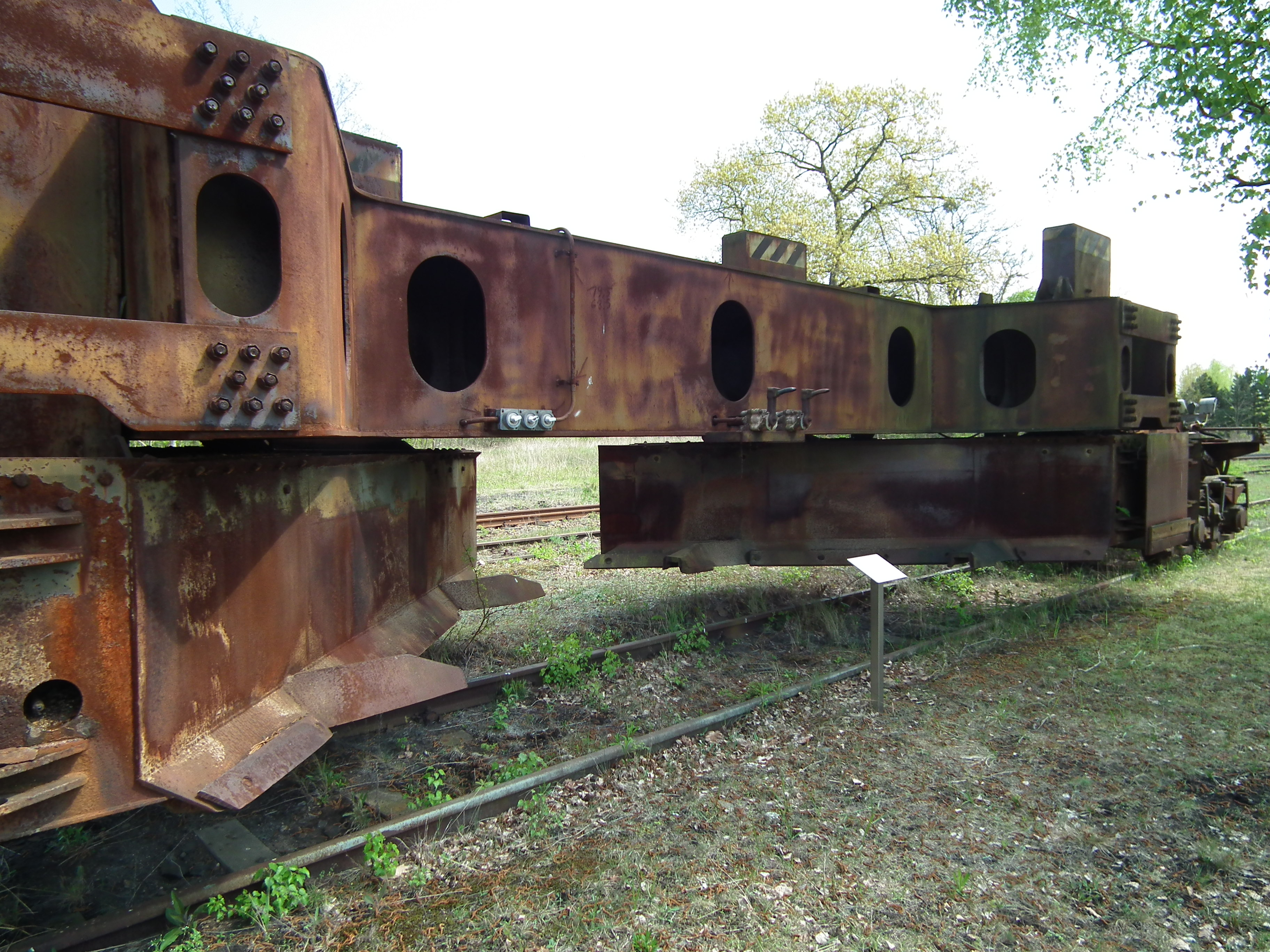 Energiefabrik Knappenrode 2016-05-05; Birkpflug